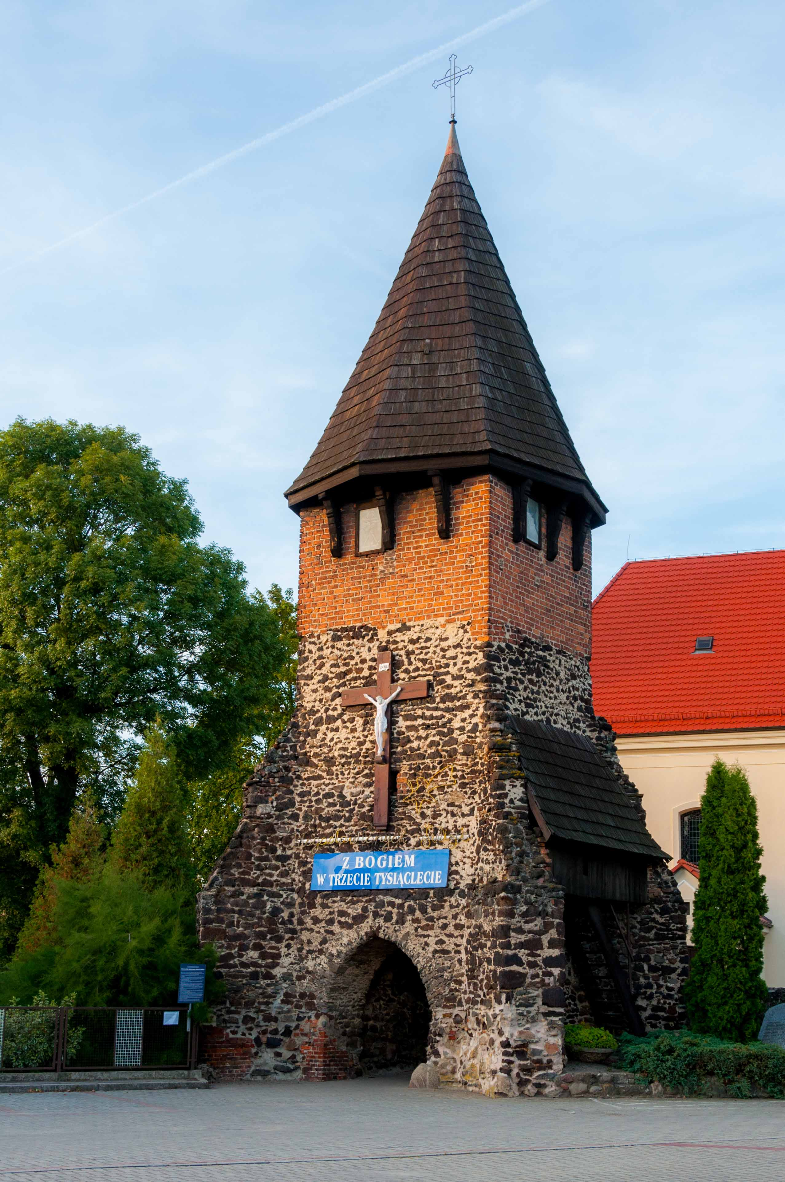 Chróścina, kościół par. p.w. śś. Piotra i Pawła, 1792, XX